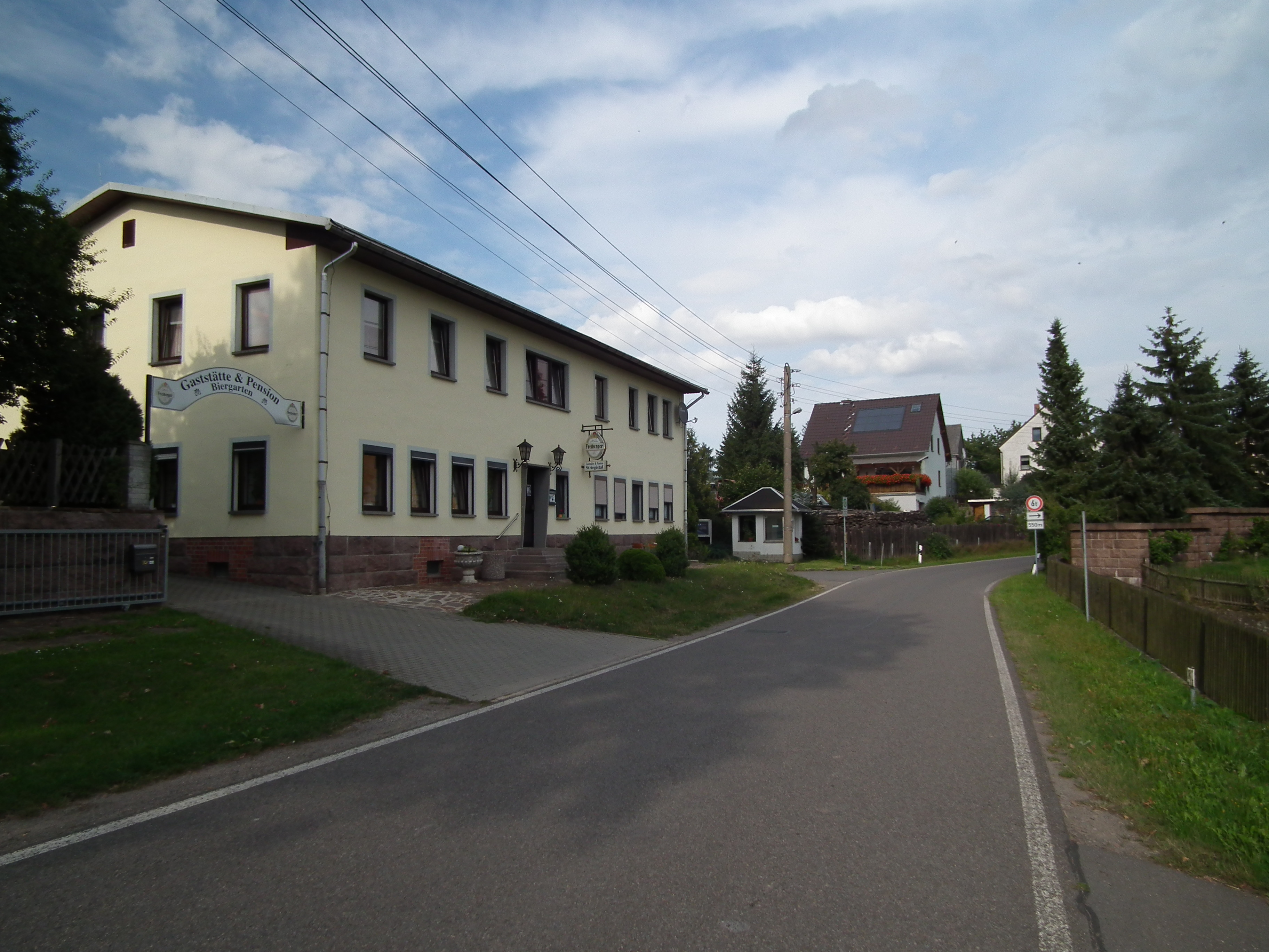 Ortansicht Goßberg